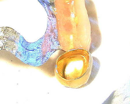 Außenteleskop (=Sekundärteil) von innen fotografiert; Oberkiefer Teleskopprothese - mit skelettierter Gaumenplatte und 3 Teleskopen